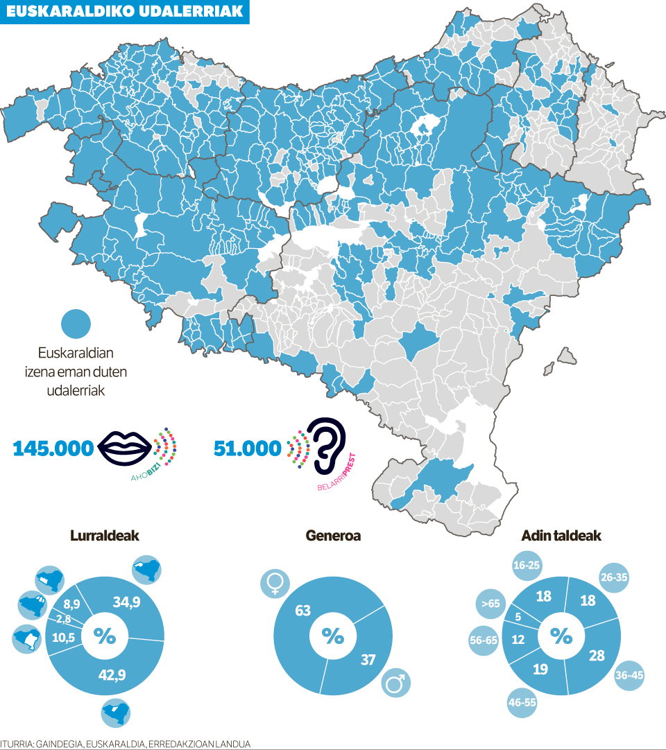 Euskaraldia ekimeneko parte hartzaileen datuak, herriaren, generoaren, adin tartearen eta hartutako rolaren arabera